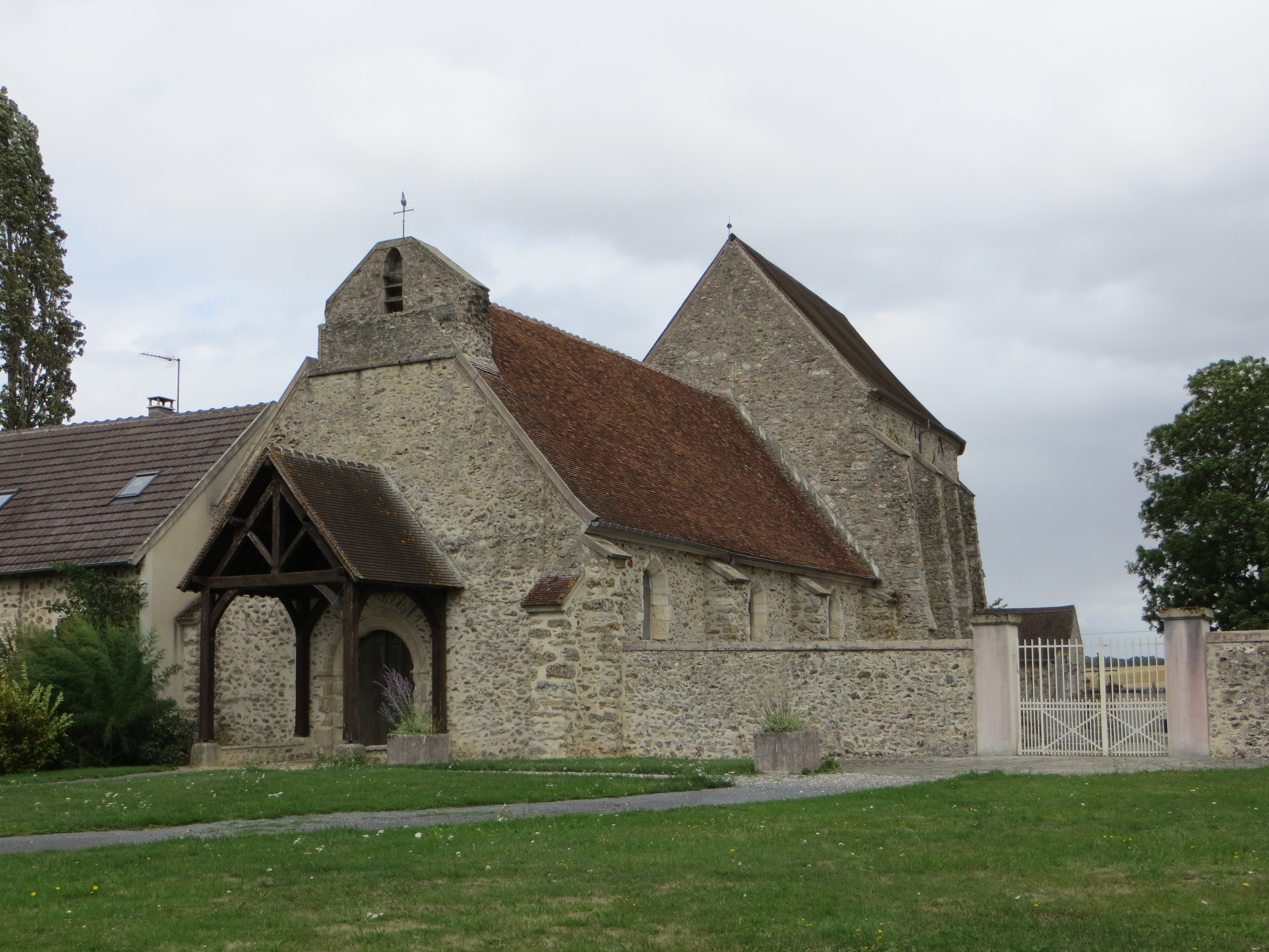 Vue de l'église